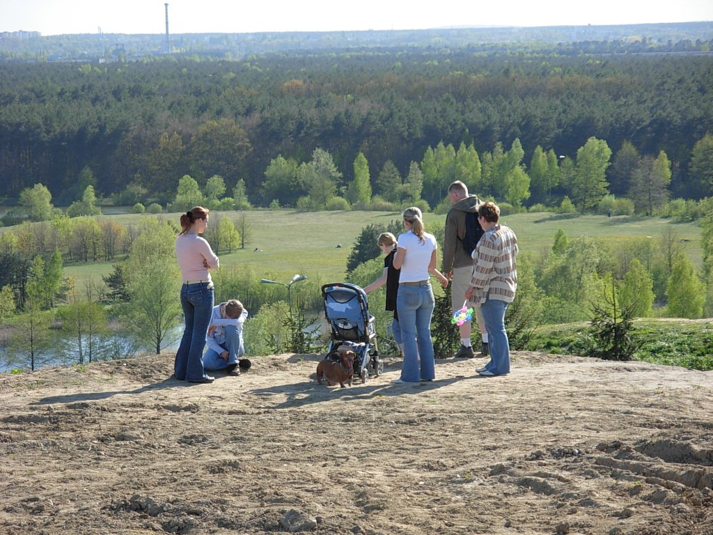 Widok ze wzgórza w Myślęcinku